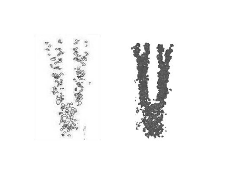 Extremitätenentwicklung Computersimulation